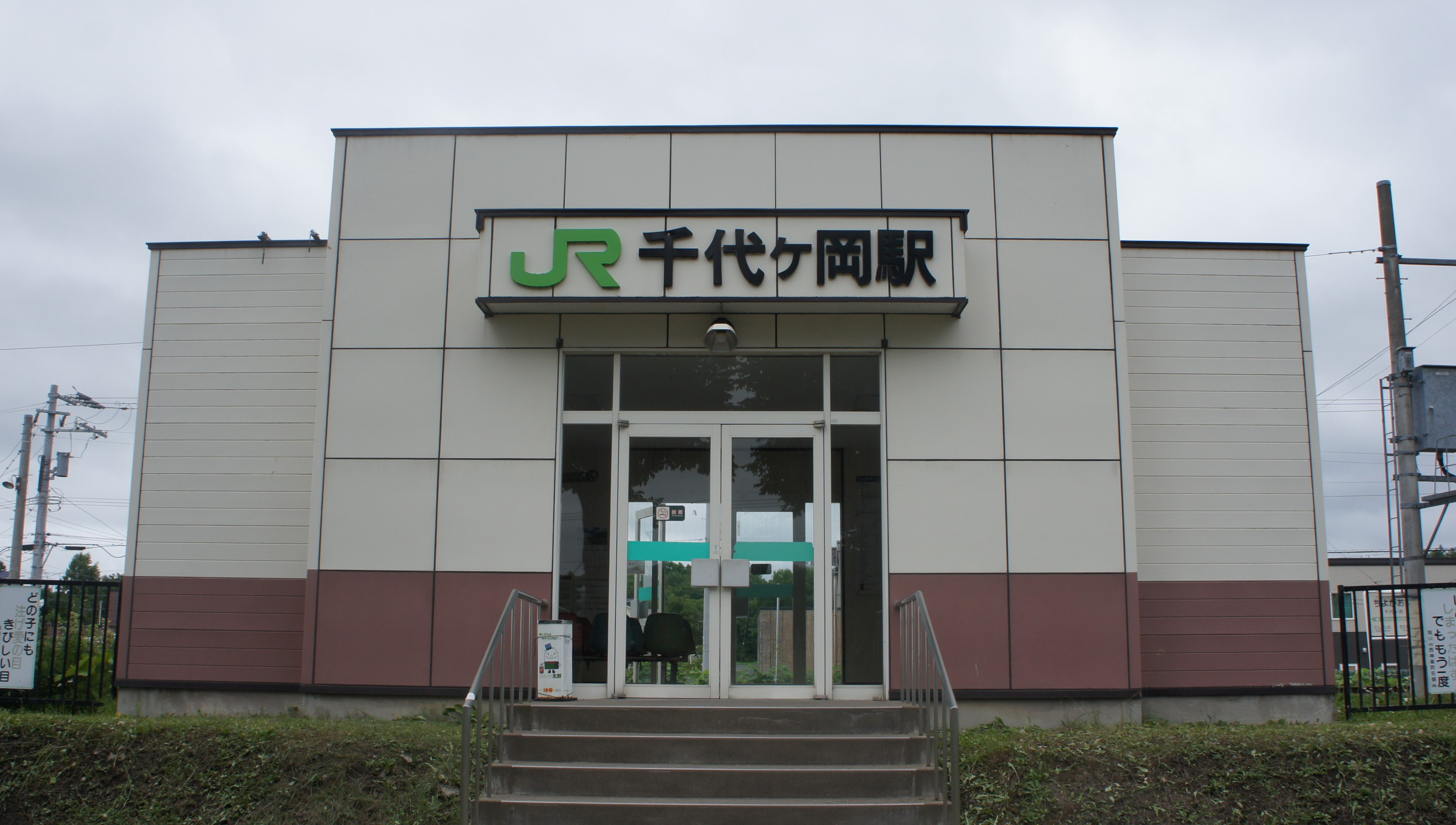 JR富良野線・千代ヶ岡駅の駅舎